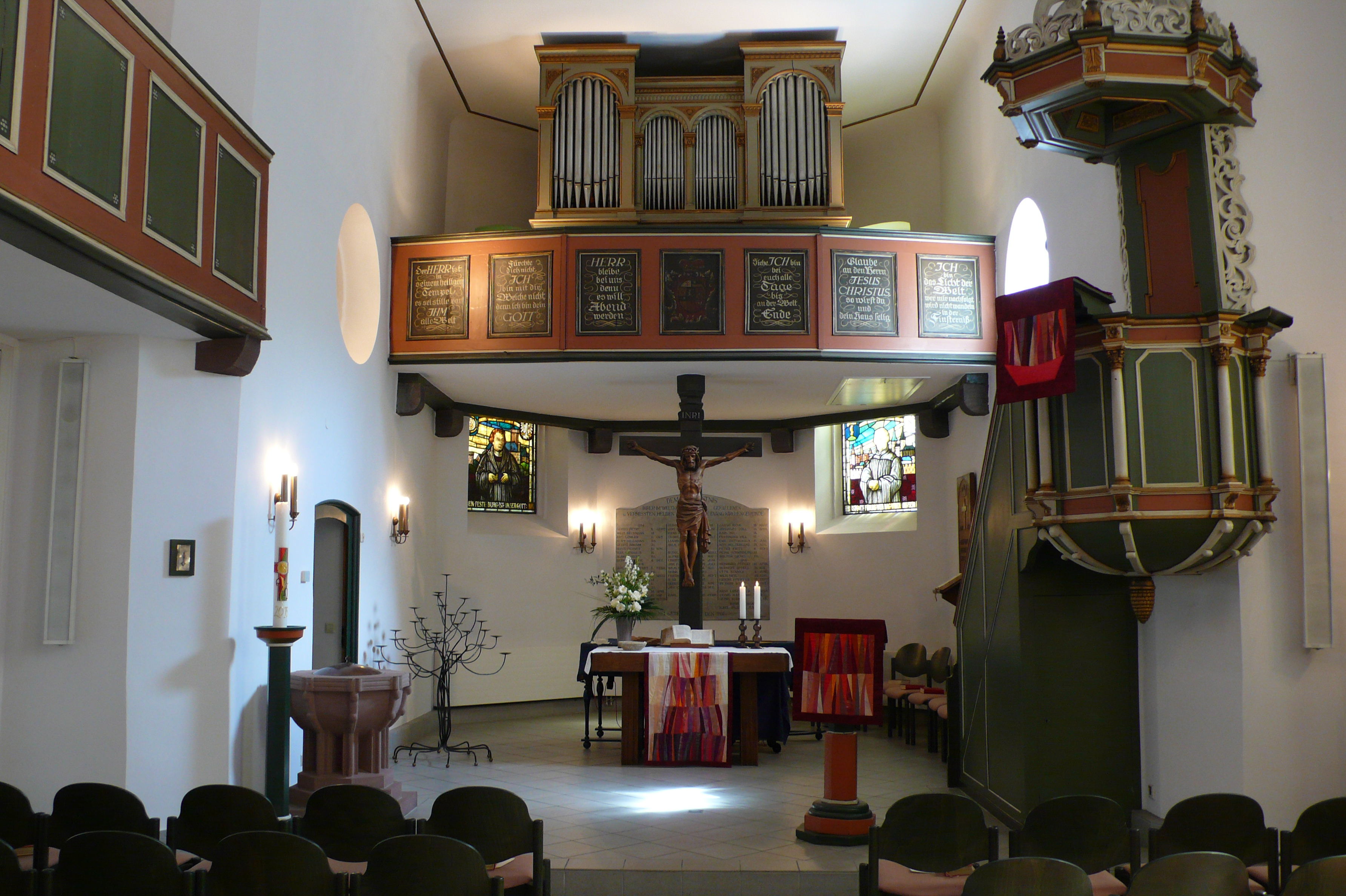 Evangelische Emmauskirche in Frankfurt-Eschersheim von 1754, denkmalgeschützt, barocke Saalkirche mit gotischem Chorraum des Vorgängerbaus mit Fünfachtelschluss, Buntglasfenster zeigen Luther und Melanchthon, Orgel von 1909 von Wilhelm Ratzmann